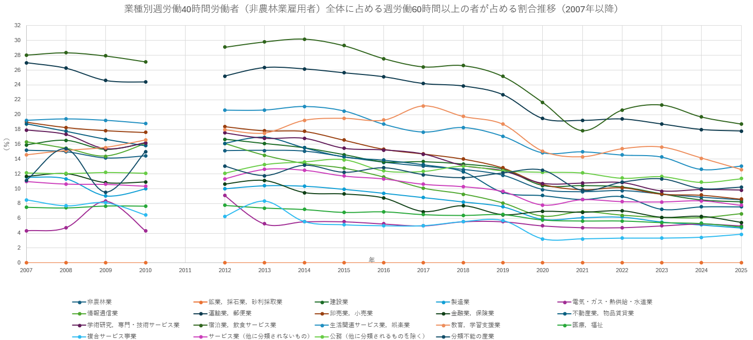 業種別労働者（非農林業雇用者）全体に占める週労働60時間以上の者が占める割合推移（2007年以降）